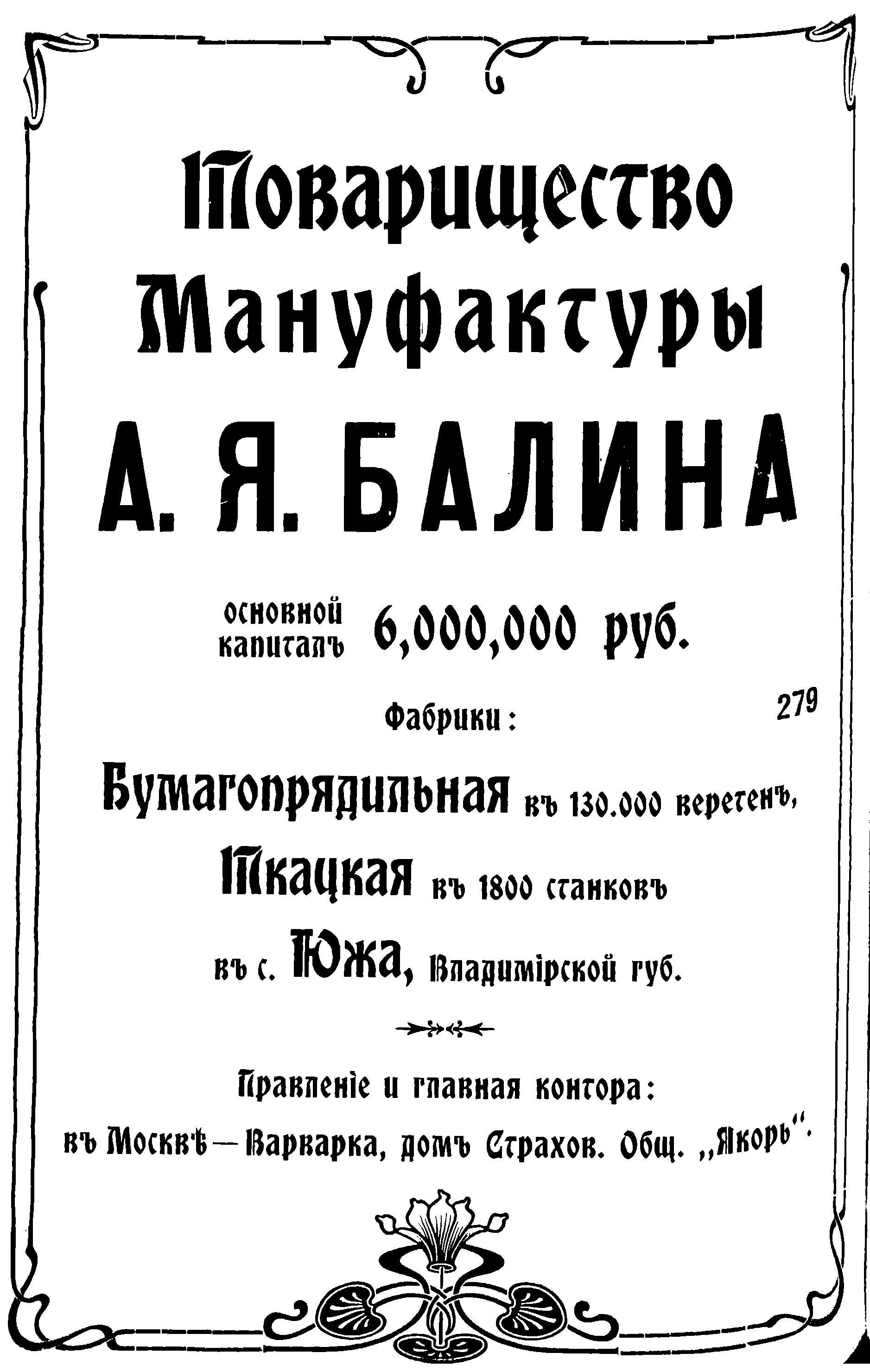 Реклама Товарищества мануфактуры А. Я. Балина. 1909 г. Опубликована в книге: Фабрично-заводские предприятия Российской империи на 1909 год. / сост. Л. К. Езиоранский. СПб., 1909.